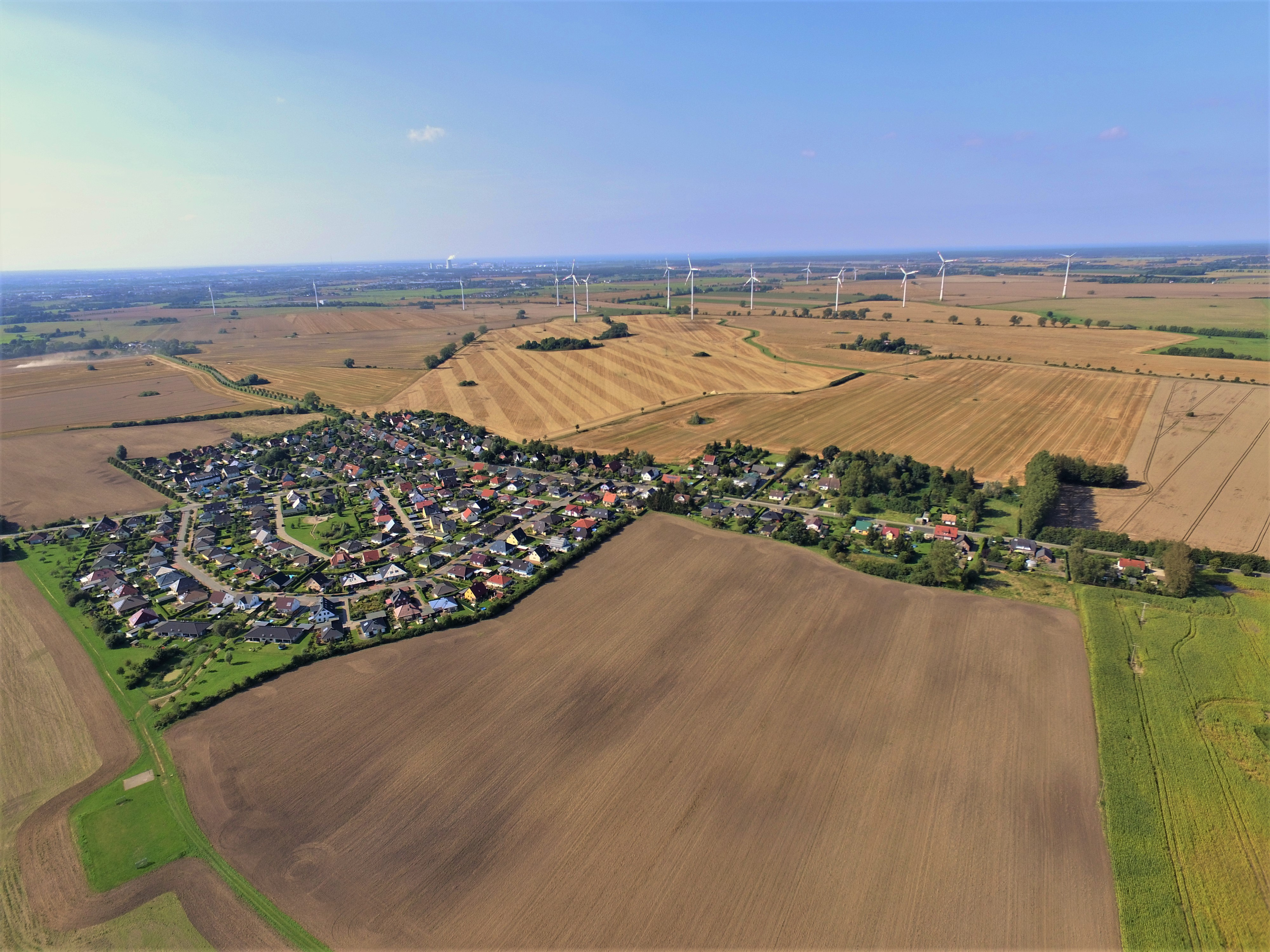 Ein Luftbild von Neu Broderstorf mit dem Windpark Broderstorf-Fienstorf im Hintergrund, aufgenommen 2017.